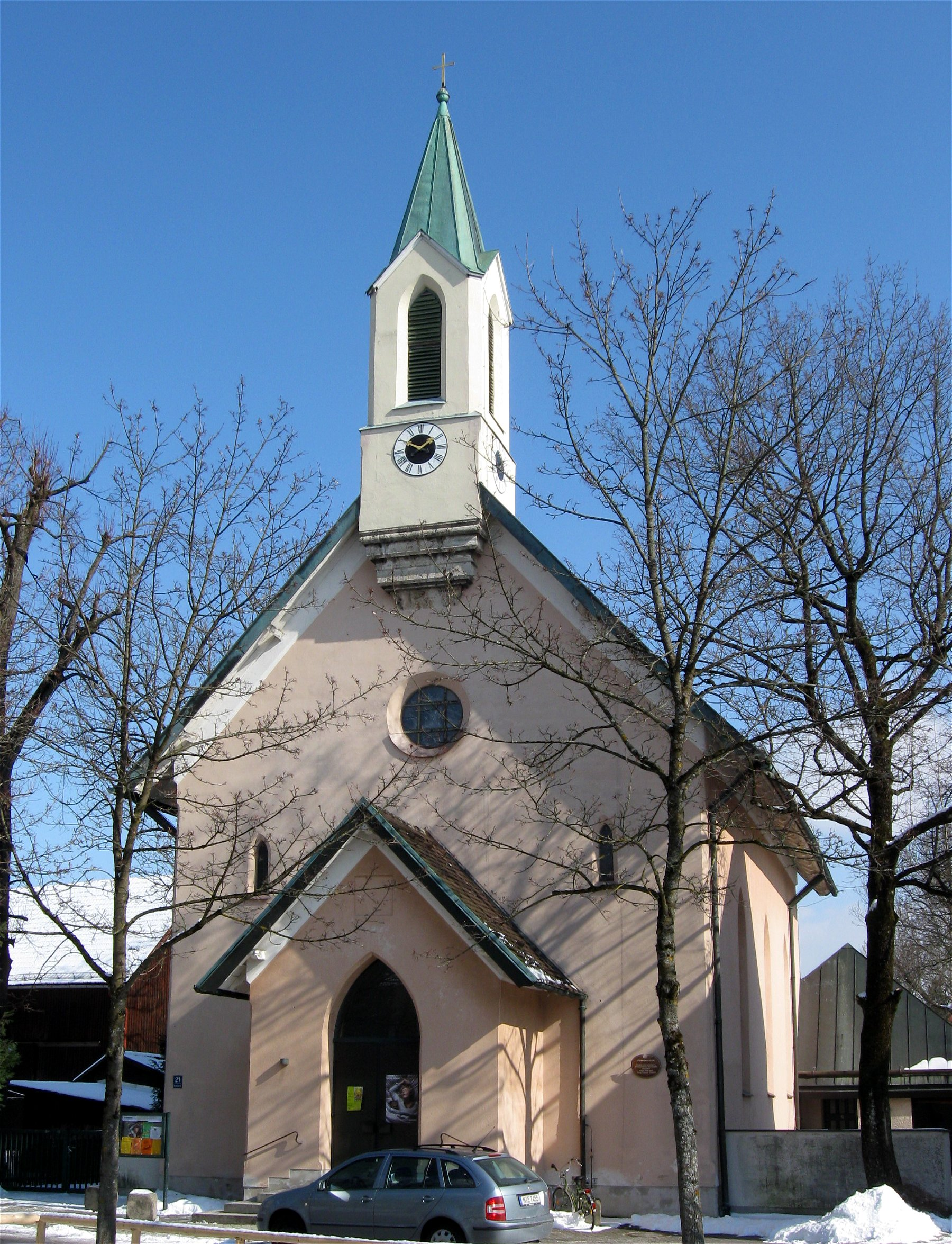 Sebastian-Bauer-Straße 21; Evang.-Luth. Kirche St. Paul, neugotischer Bau mit Giebelreiter, 1848-49 von Georg Friedrich Ziebland; München-Perlach